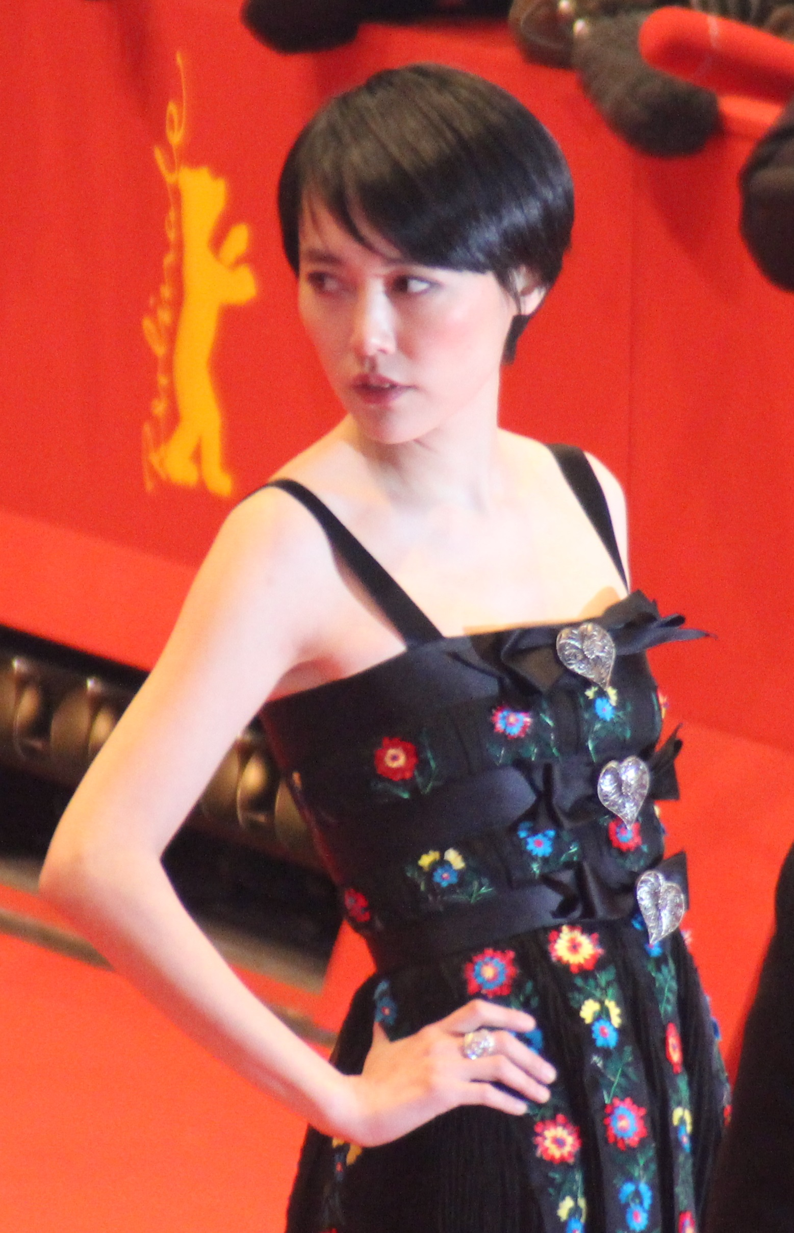 Rinko Kikuchi bei der Premiere ihres Films Nobody Wants The Night bei der Berlinale.